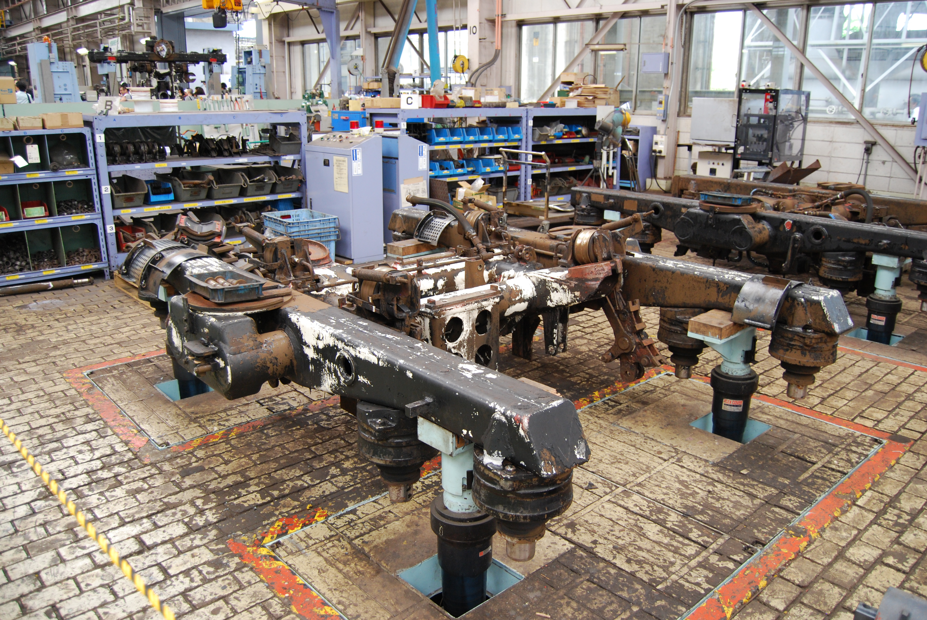 全般検査又は重要部検査中の台車、車輪や軸バネやブレーキ装置が完全に取り外され台車枠のみとなっている（JRおおみやふれあい鉄道フェアーの工場開放にて撮影）